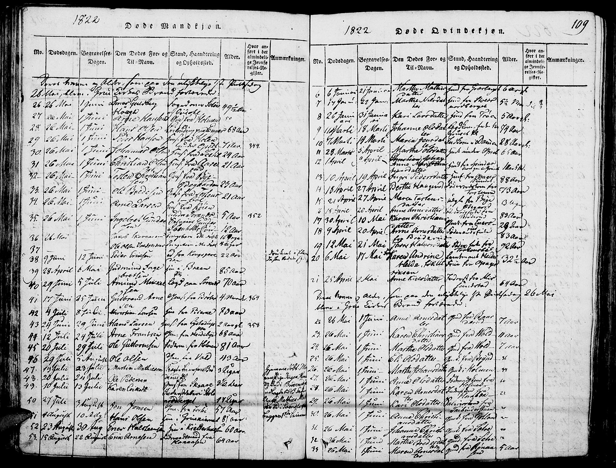 Auszug aus dem Kirchenbuch von Grue mit elf Namen der Opfer des Kirchenbrandes von Grue (1822)